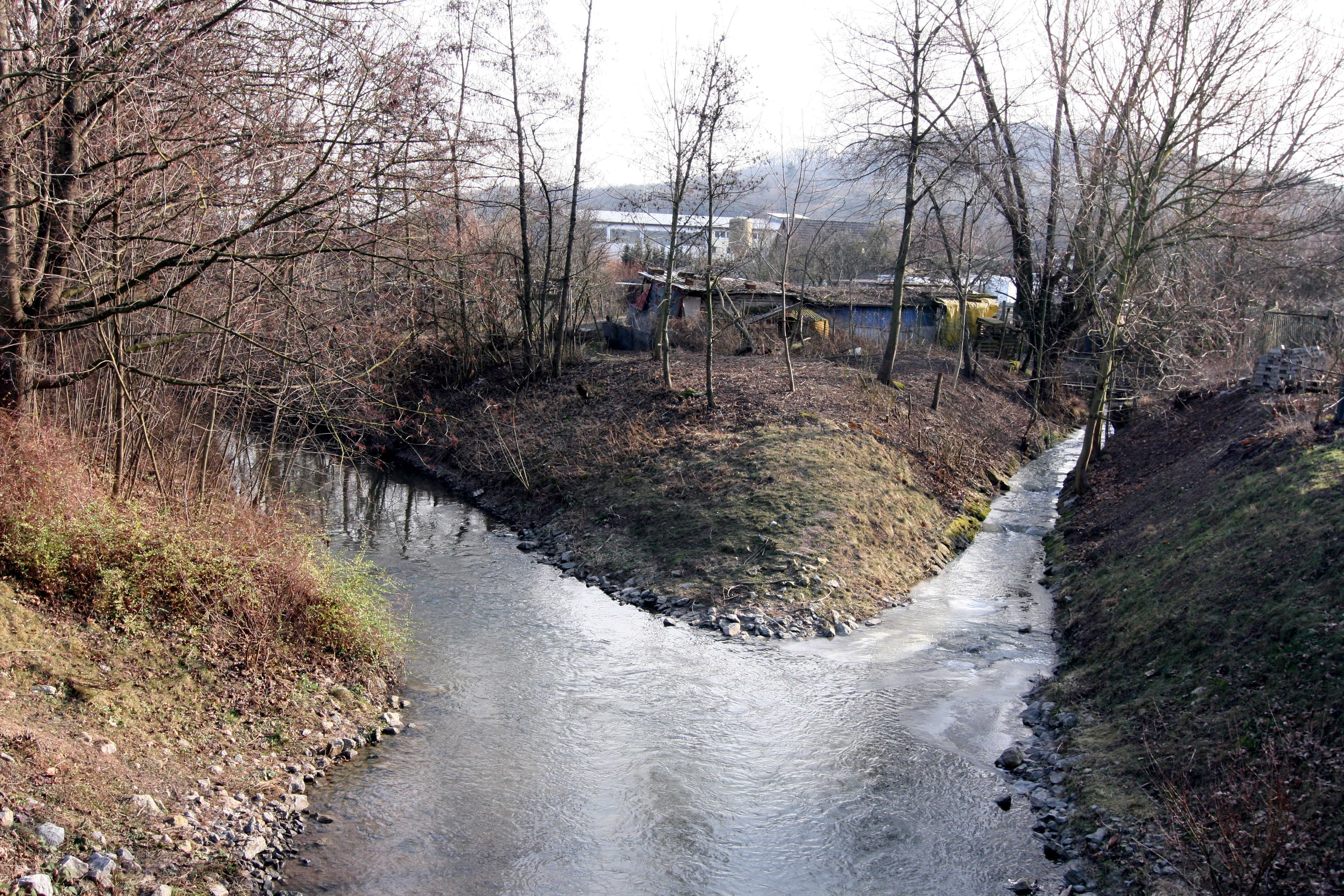 Die Mündung des Weinsberger Bachs bzw. Stadtseebachs (rechts) in die Sulm (links) in Erlenbach